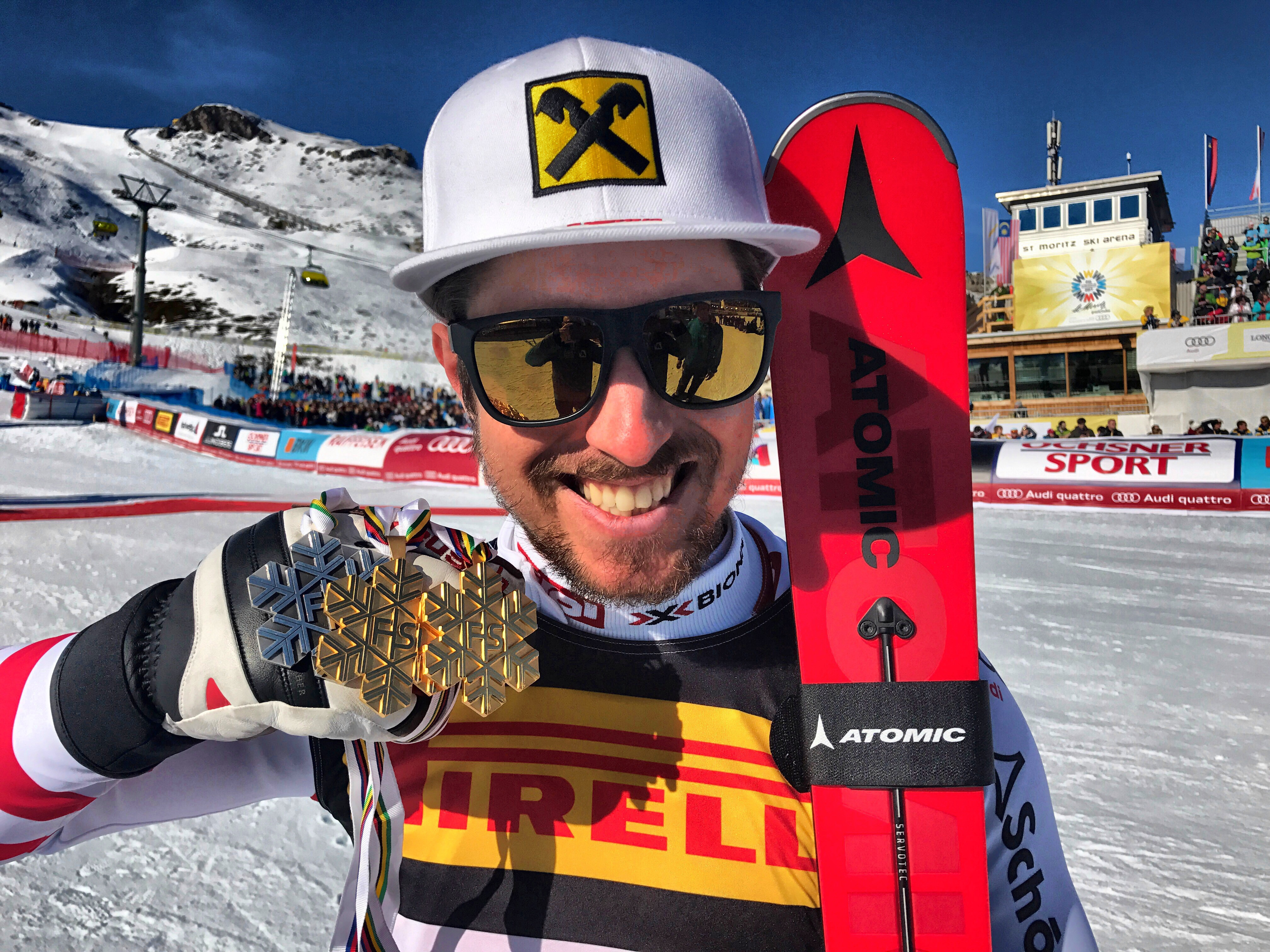 Marcel Hirscher, alpine Skier, World Championsship, St. Moritz